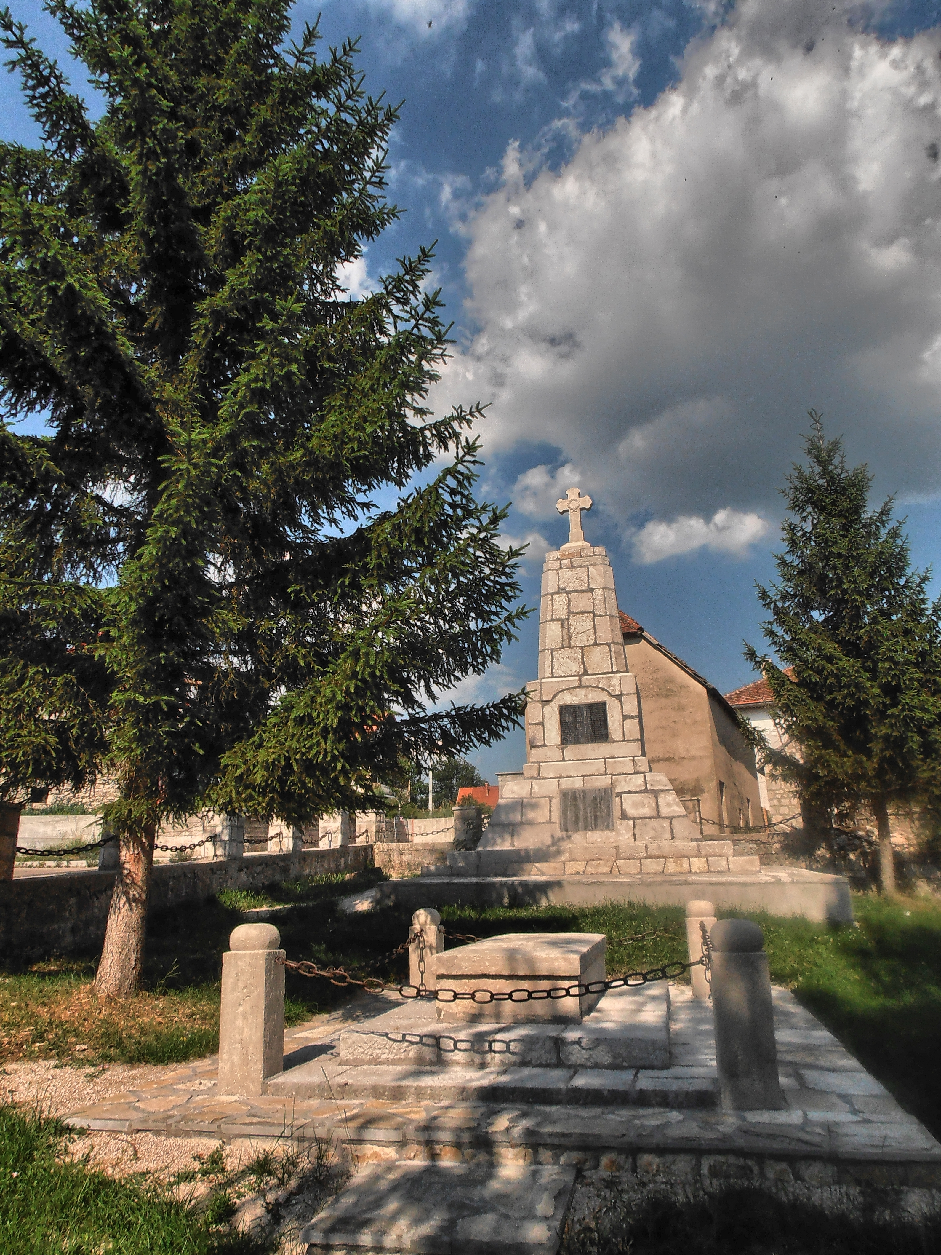 NKD308 Spomenik iz 1934. godine posvećen srpskim dobrovoljcima obješenim 1916.godine u Avtovcu. Na gornjoj tabli se nalazi spisak palih boraca,a na donjoj kratka zahvalnica za njihovu žrtvu: ,,Iz viteške borbe vaše sloboda nas obajsala besmrtnici zemlje ove svima vama vječna hvala""